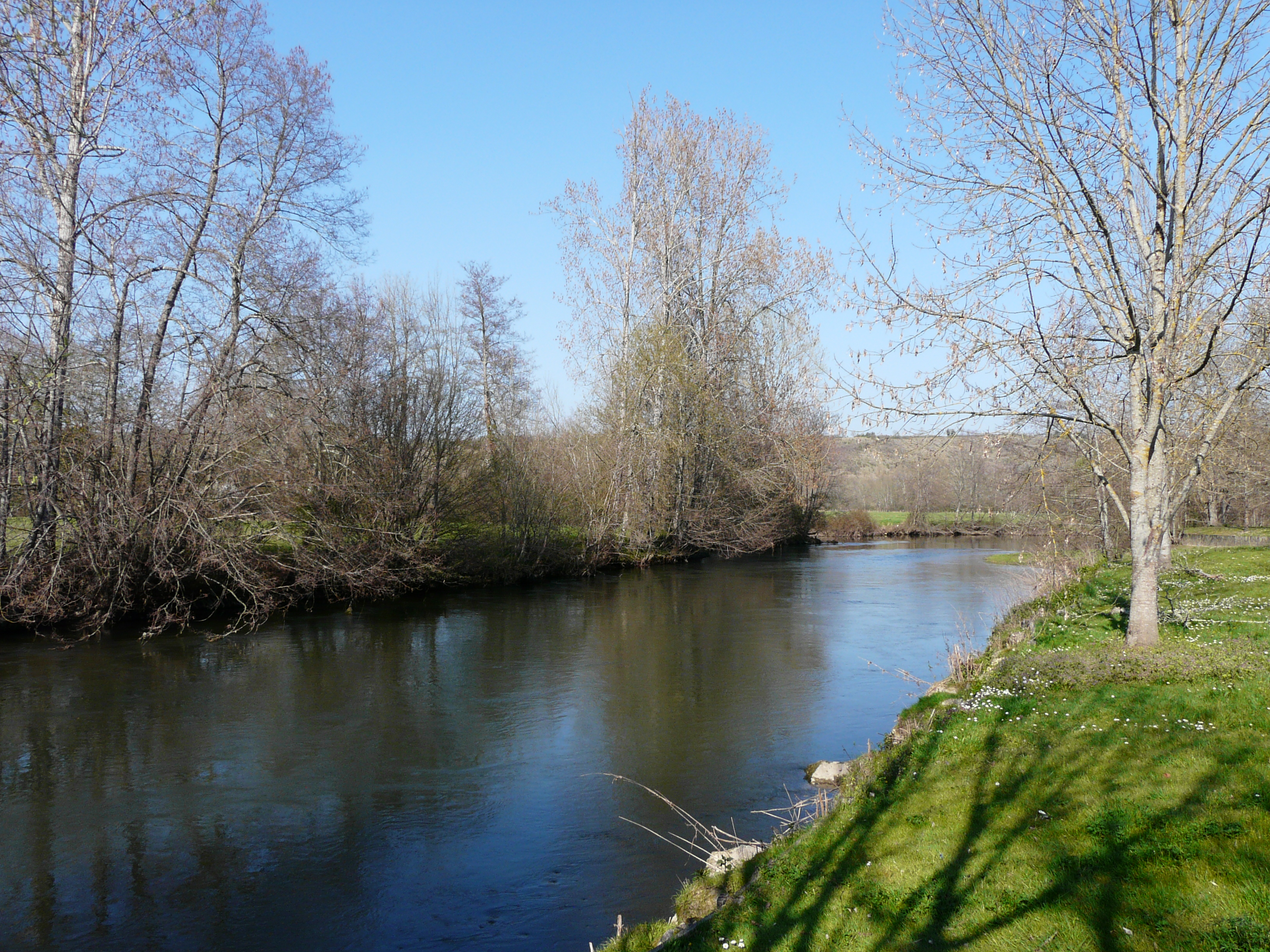 La Dronne au lieu-dit Beauclair entre Douchapt (au premier plan) et Saint-Victor (sur la rive opposée), Dordogne, France. Vue prise en direction de l'amont.